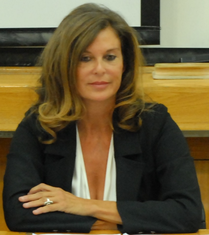 לימור שריר עם עמוס עוז; בקורס "ספרות ורפואה", הפקולטה לרפואה, אוניברסיטת תל אביב